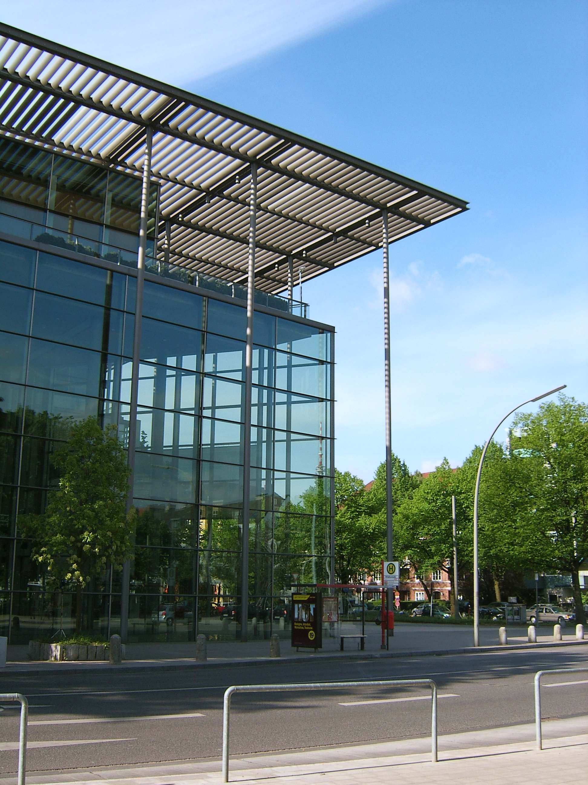 Bildbeschreibung: Hamburg, Rotherbaum, Medienzentrum (erbaut 1999, Architekt Norman Foster & Partner) Fotograf: selbst Datum: 15.5.2006